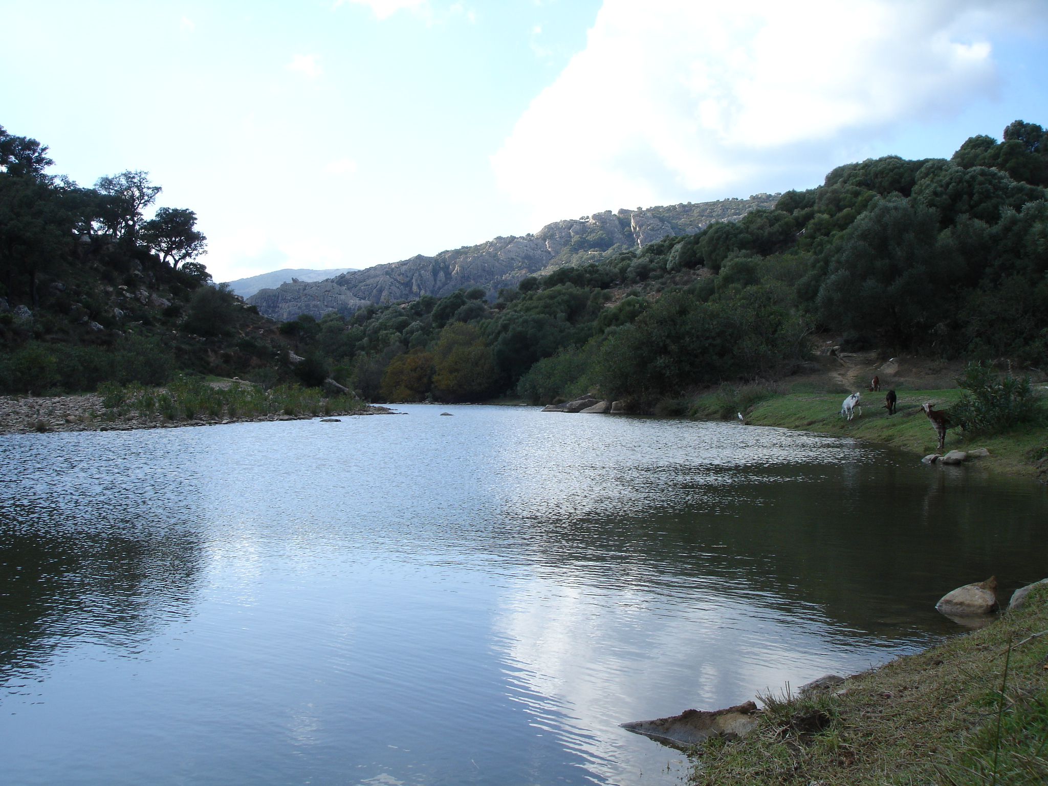 Río Horgarganta